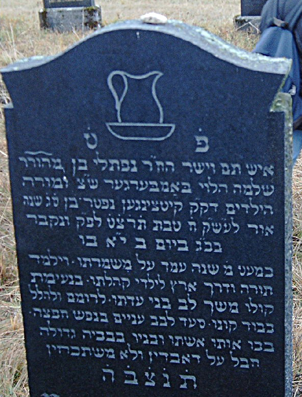 Grabstein im Judenfriedhof von Rödelsee